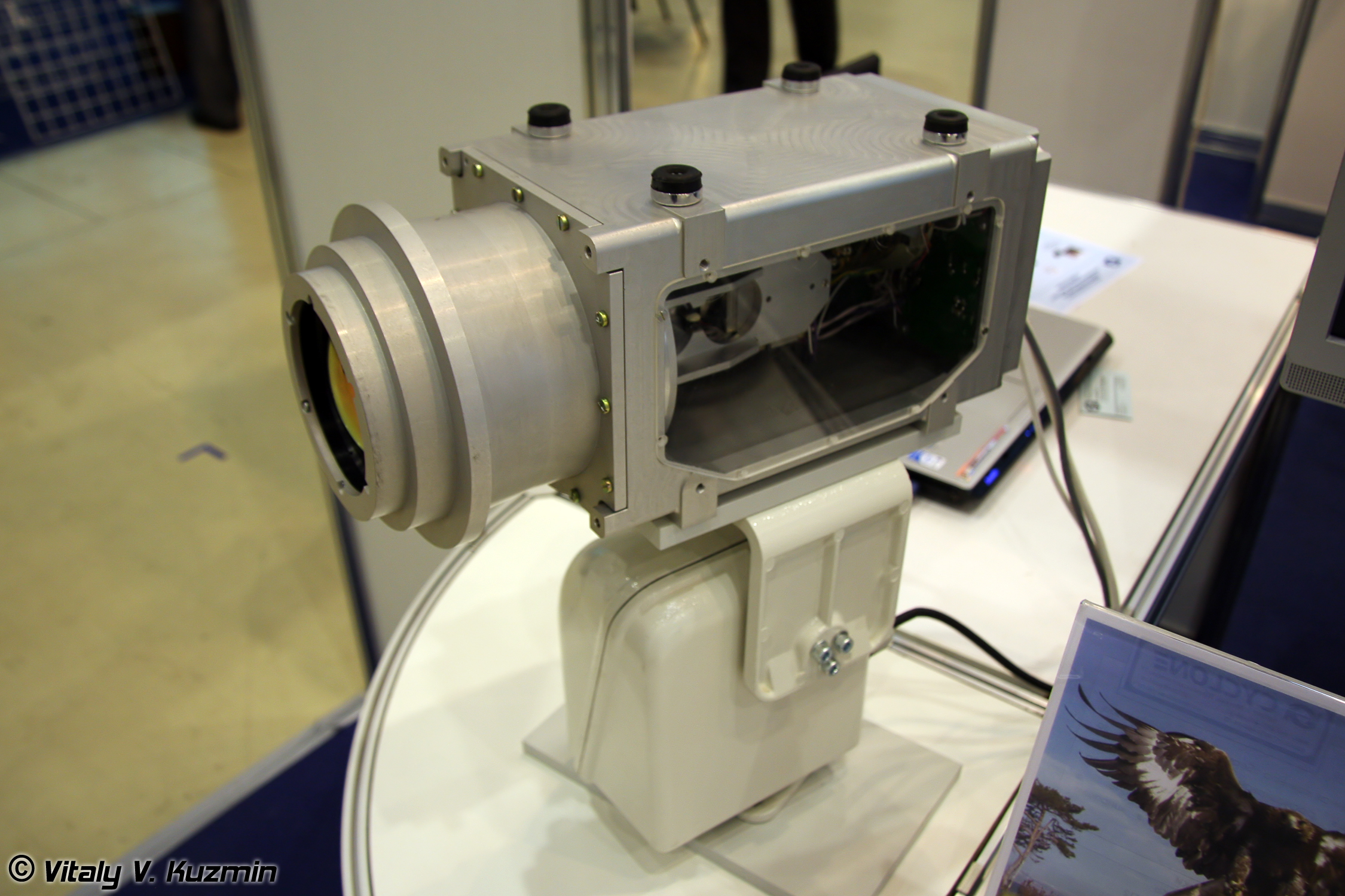 Охлаждаемая тепловизионная камера Беркут (Berkut thermal imaging camera)